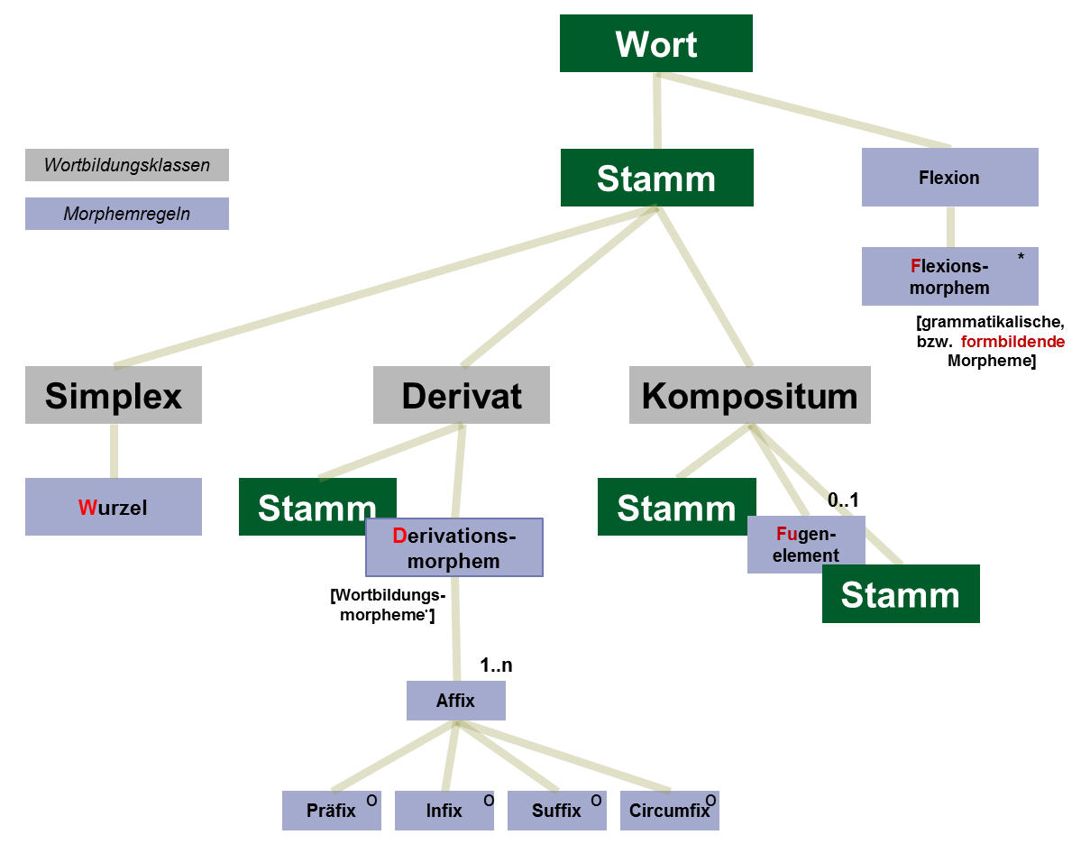 Morphematische Strukturen von deutschen Wörtern. Systematik in Anlehnung an: Volmert; Grundkurs Sprachwissenschaft; UTB; 2005